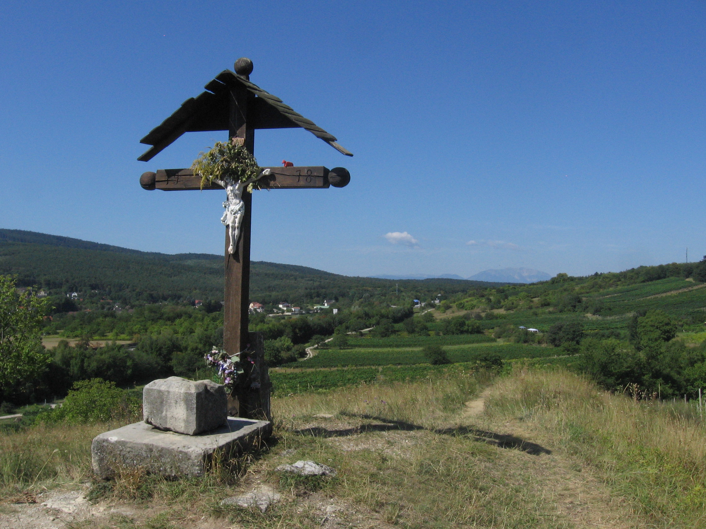 Wurtkreuz im Naturpark Rosalia-Kogelberg